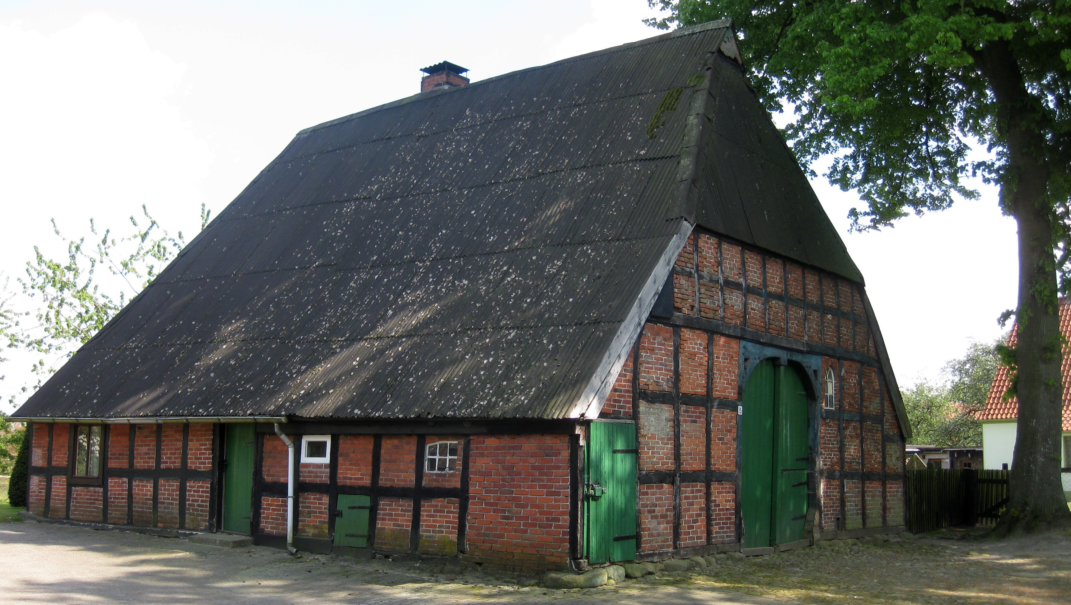 Fachwerkhaus Dorfstr. 35 in Westerbeverstedt (Lunestedt)